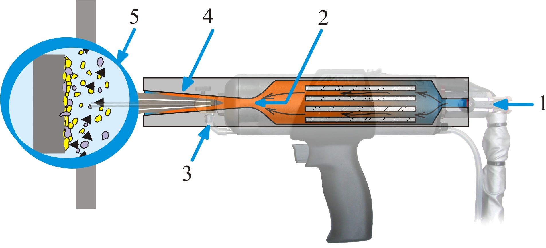 Схема процесса напыления металлических покрытий методом холодного газодинамического напыления воздухом низкого давления (LPSC).